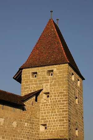 Payerne: einer der mittelalterlichen Türme